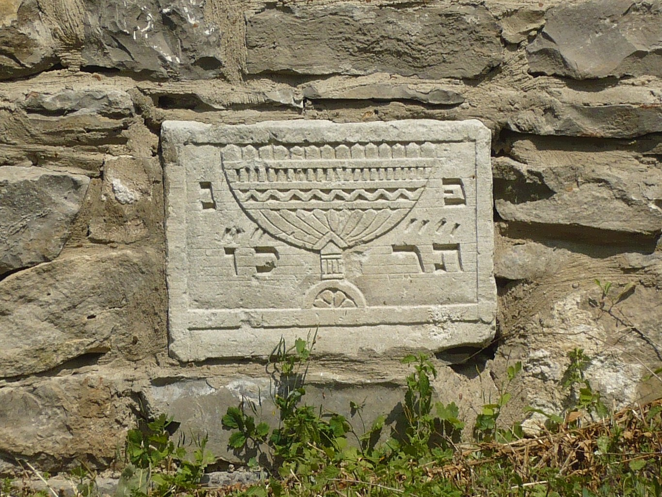 Tablica na murze wokół kościoła ormiańskiego pw. Niepokalanego poczęcia NMP